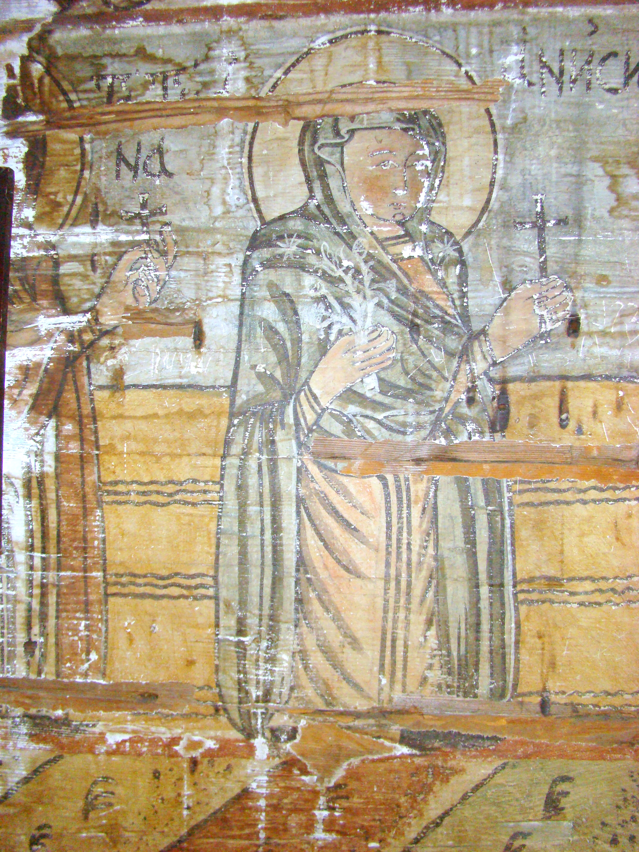 Biserica de lemn din Someșu Rece, județul Cluj